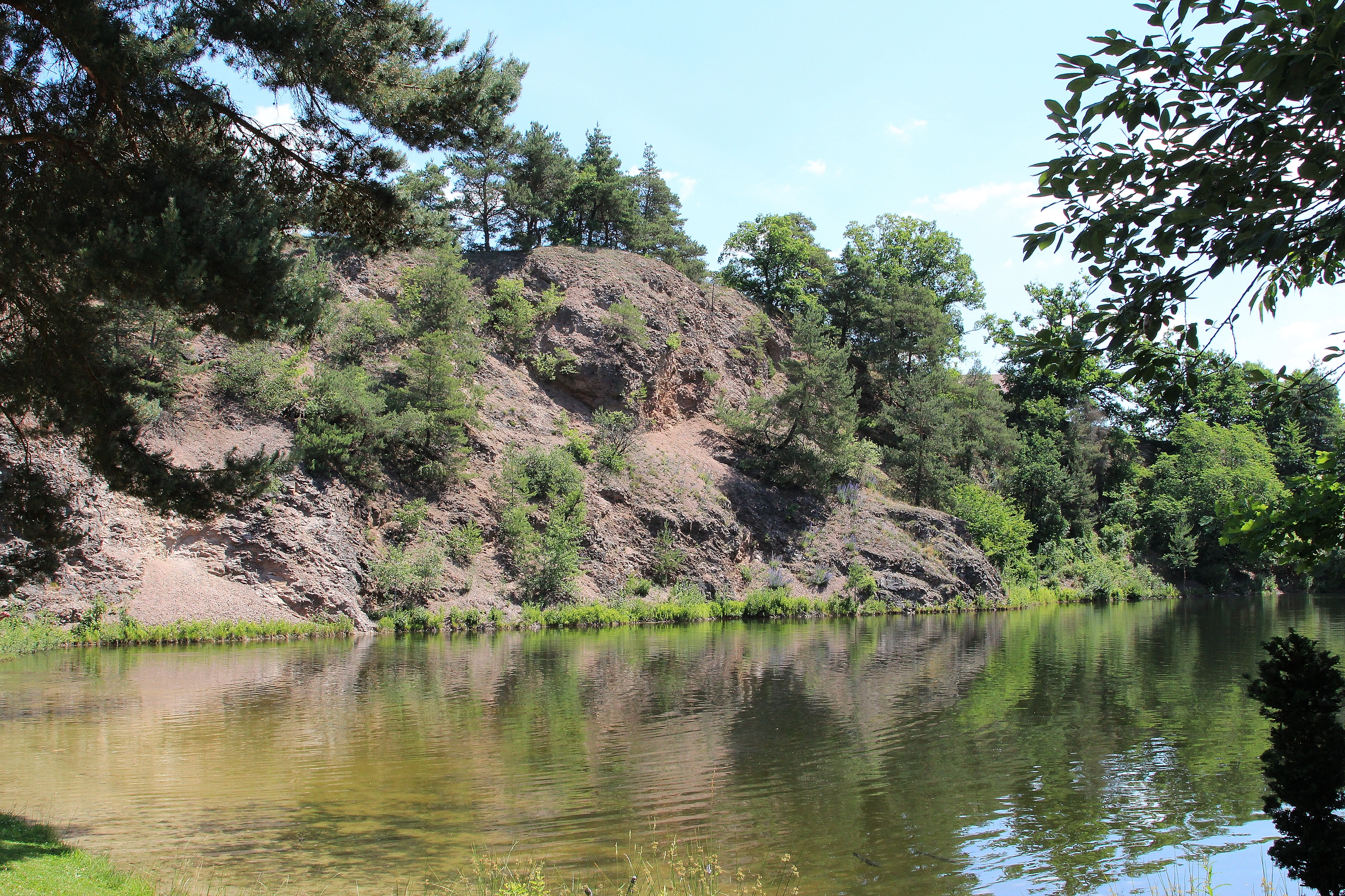 Pingartner Porphyr: Der Geotop „Ehemaliger Steinbruch im Pingartner Porphyr“ erschließt „Erzhäuser Arkose“, feldspatreiches Flutsediment. Dieses Gestein erhielt durch eine Verwechslung mit einem ähnlich aussehenden vulkanischen Gestein fälschlicherweise den namen Pingartner „Porphyr“. Die Erzhäuser Arkose wurde zu Anfang des 20. Jahrhunderts hauptsächlich in Pingarten intensiv abgebaut. Sie diente als Eisenbahnschotter, bis sie der Granit als besseres Baumaterial ablöste. Seitdem fand sie nur noch gelegentlich Verwendung im gemeindlichen Wegebau. Heute ist der aufgelassene Steinbruch bei Pingarten bayernweit der einzige größere Aufschluss in Rotliegend Sedimenten und besitzt daher Seltenheitswert (Quelle: Infotafel im aufgelassenen Steinbruch in Pingarten): Pingarten, Gemeinde Bodenwöhr, Landkreis Schwandorf, Oberpfalz, Bayern